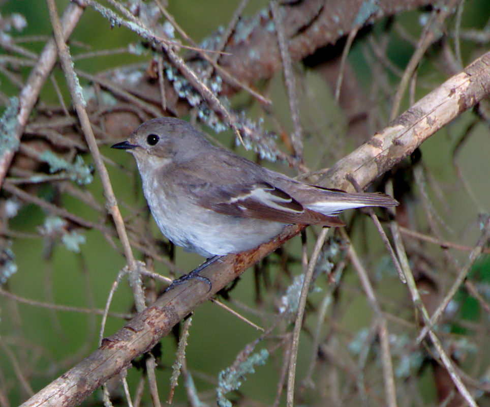 Svartvit Flugsnappare / Pied Flycatcher Ficedula hypoleuca, female; Bollebygd, Västra Götaland, Sweden